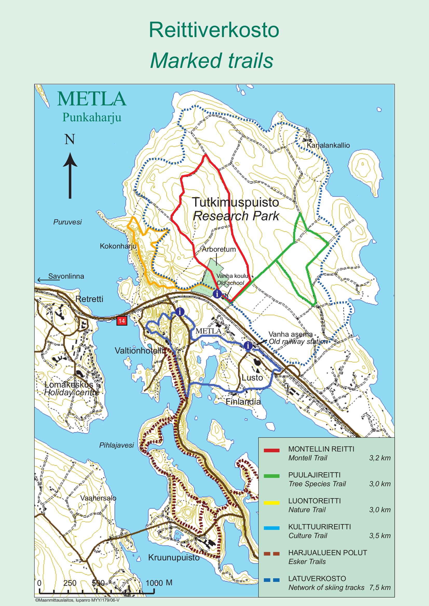 Arboretum Punkaharju, Finnland: Übersichtsplan zur Lage und Umgebung des Arboretums